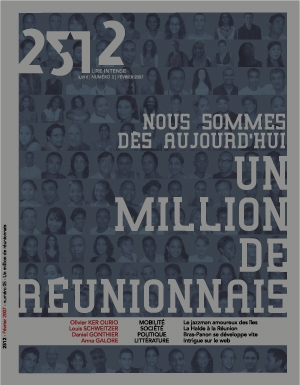 Couverture du numéro quatre du magazine 2512.